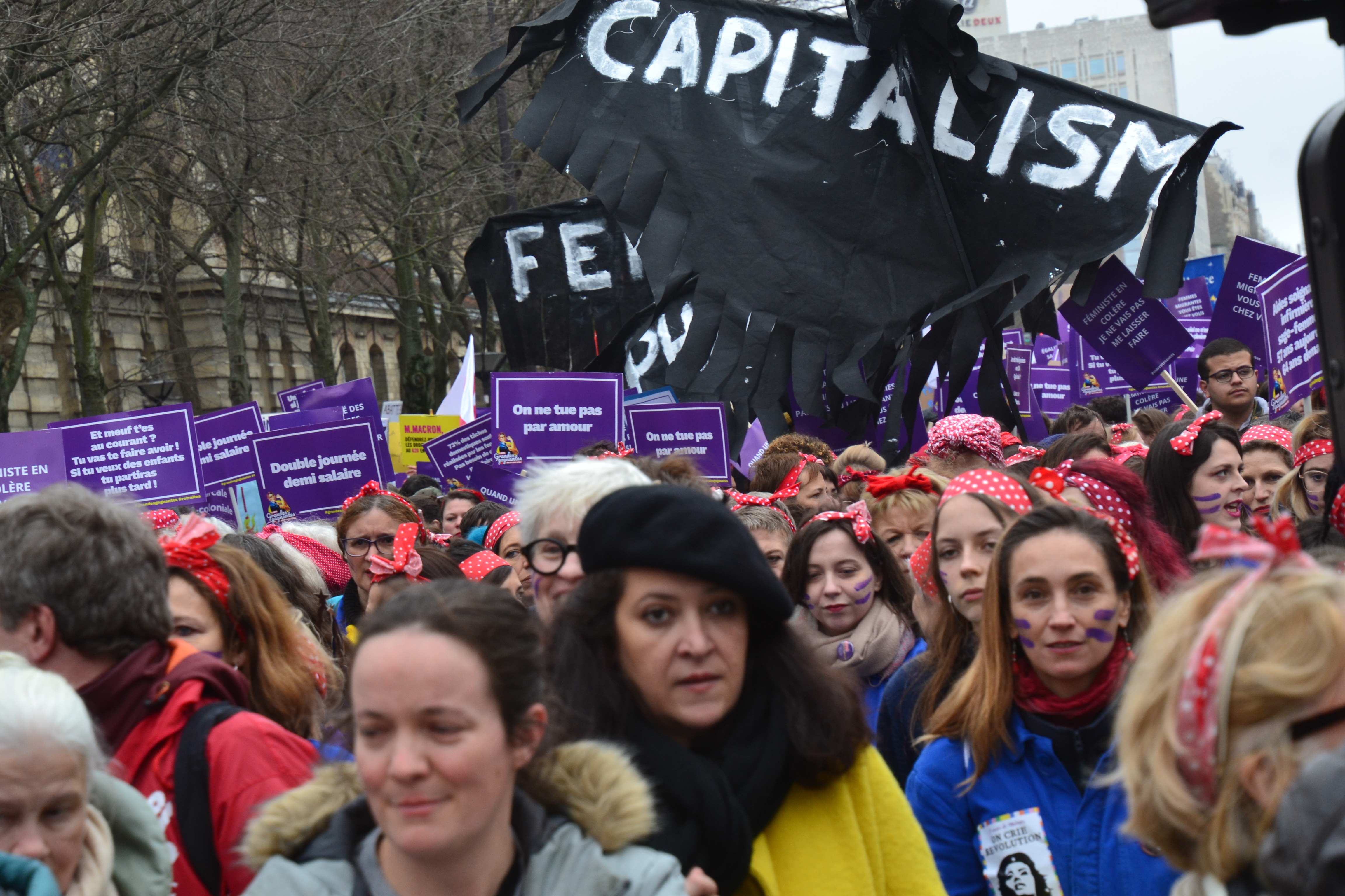 Journée internationale des droits des femmes.